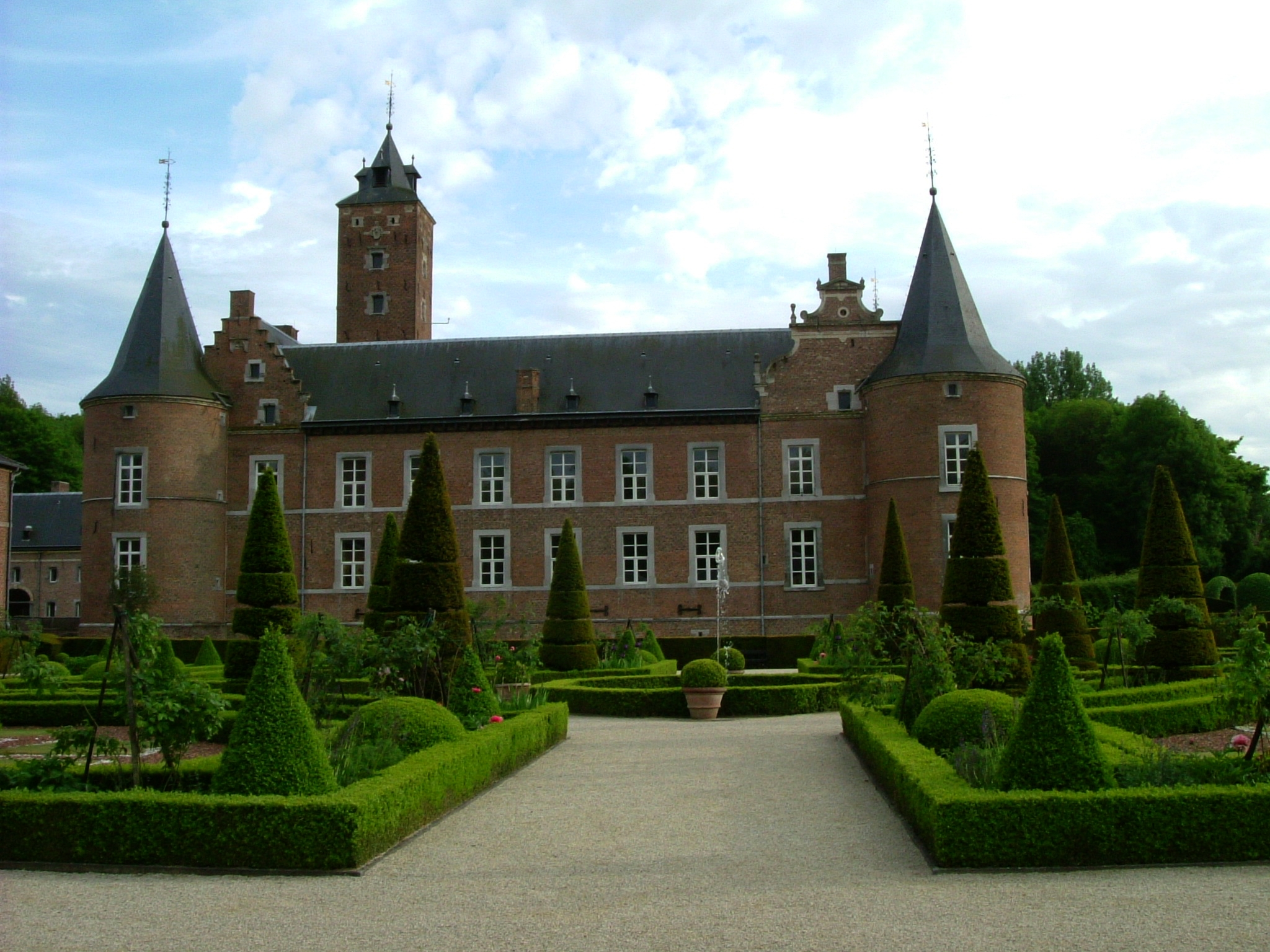 Der formale Garten von Schloss Alden Biesen